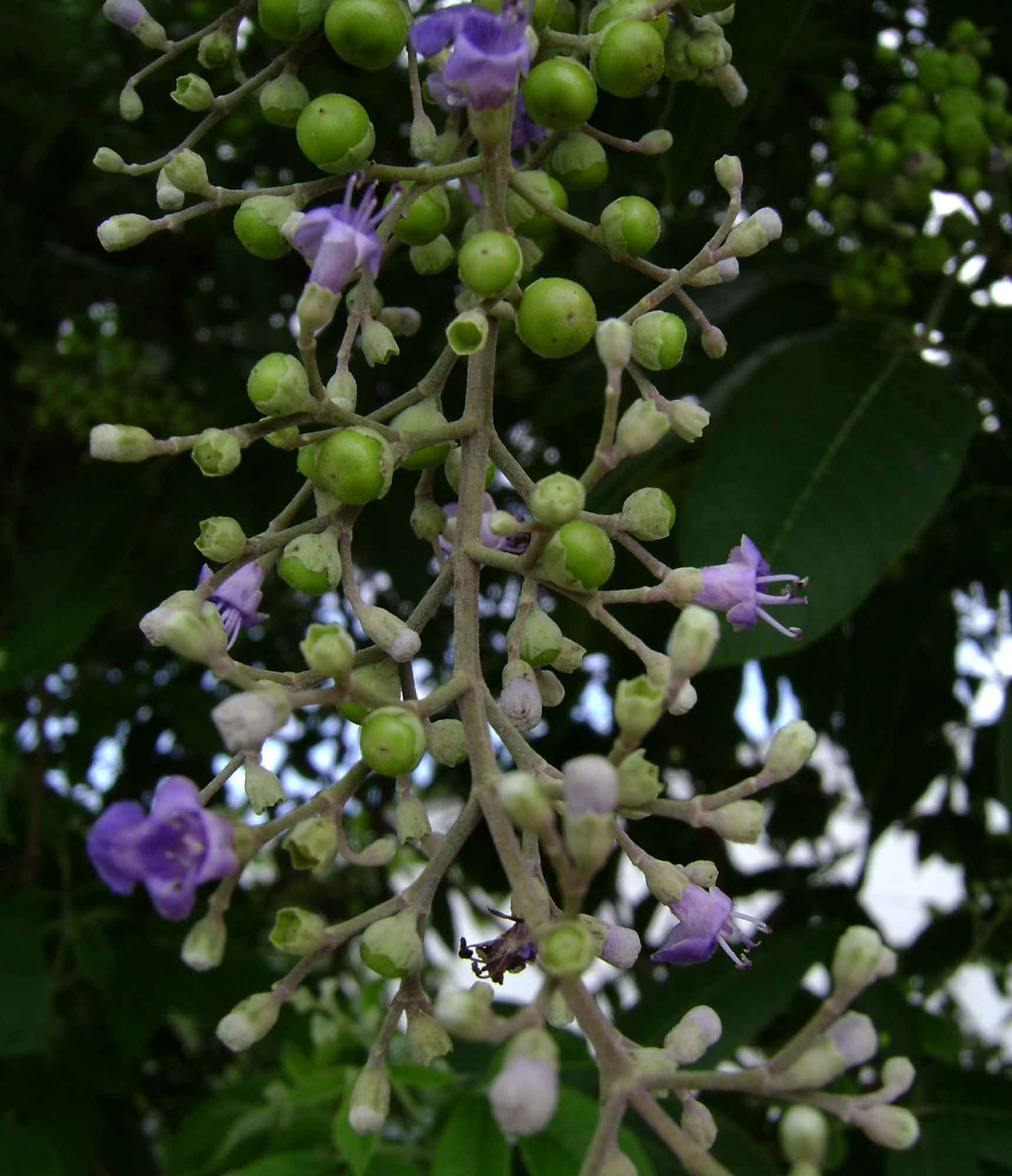 Vitex trifolia (lala) in Tonga.